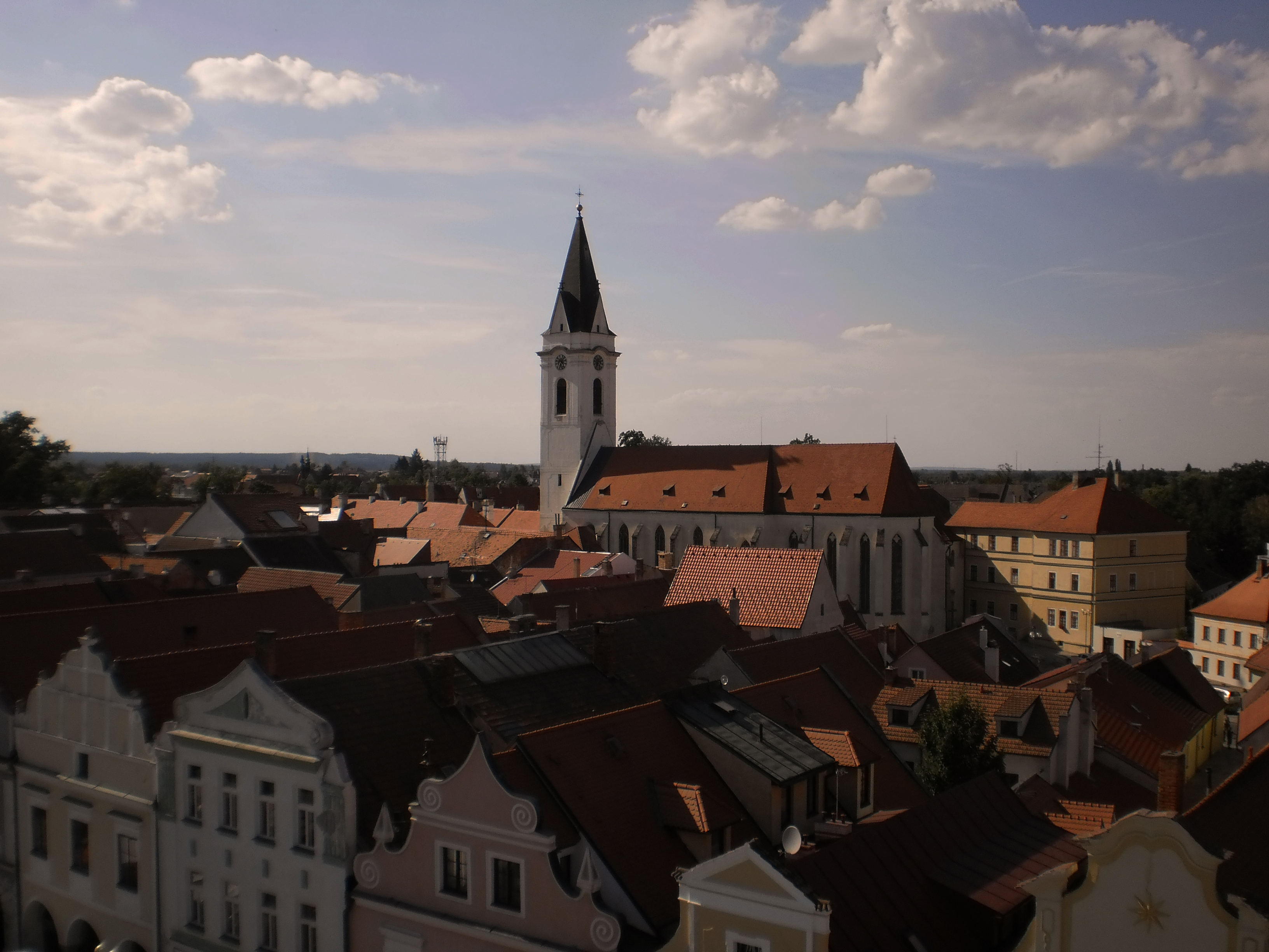 Klášter augustiniánů s kostelem sv. Jiljí a Panny Marie, Třeboň 125. Pořízeno z radniční věže (převýšení 85,6 m nad městem).